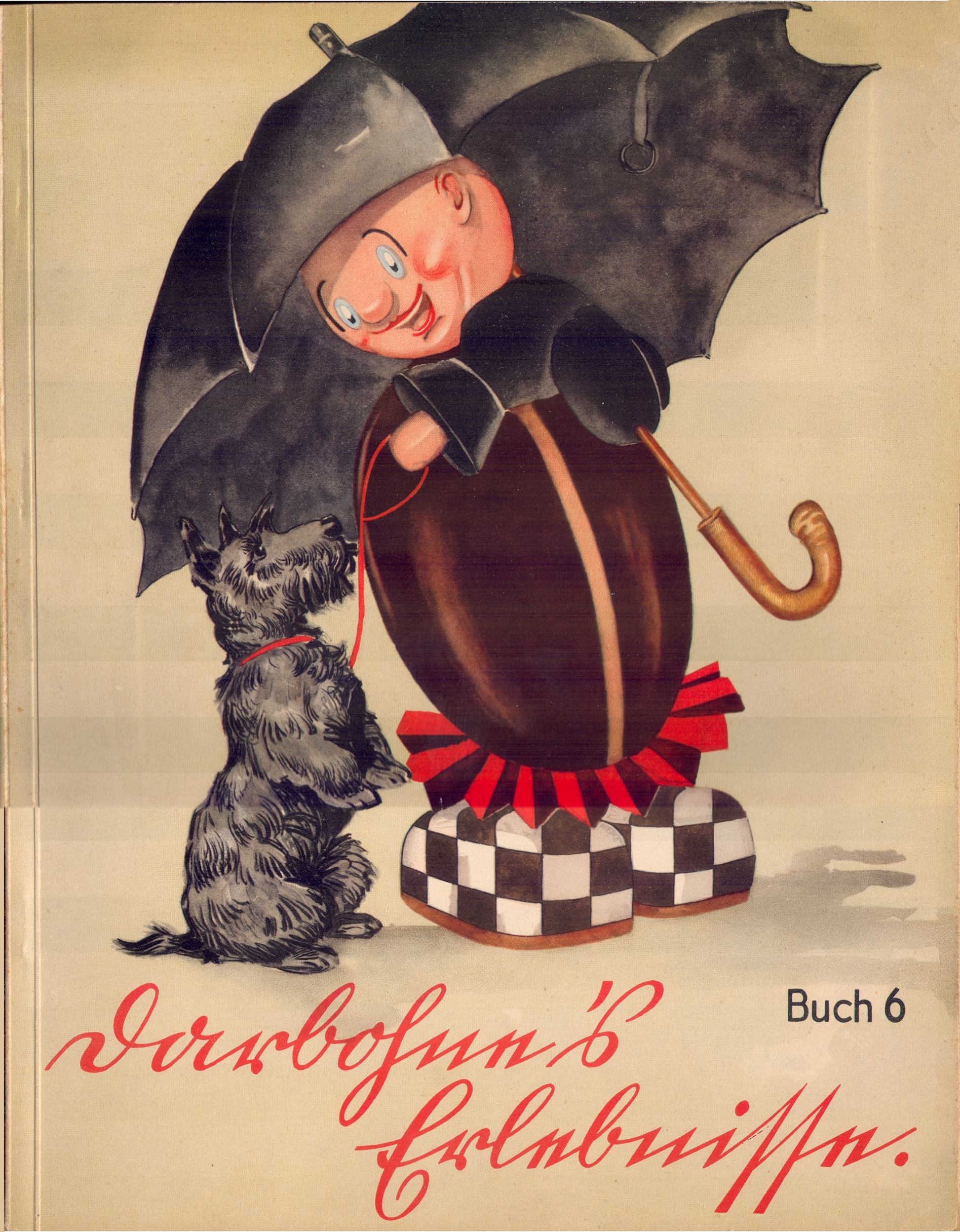 Scan vom eigenen Original